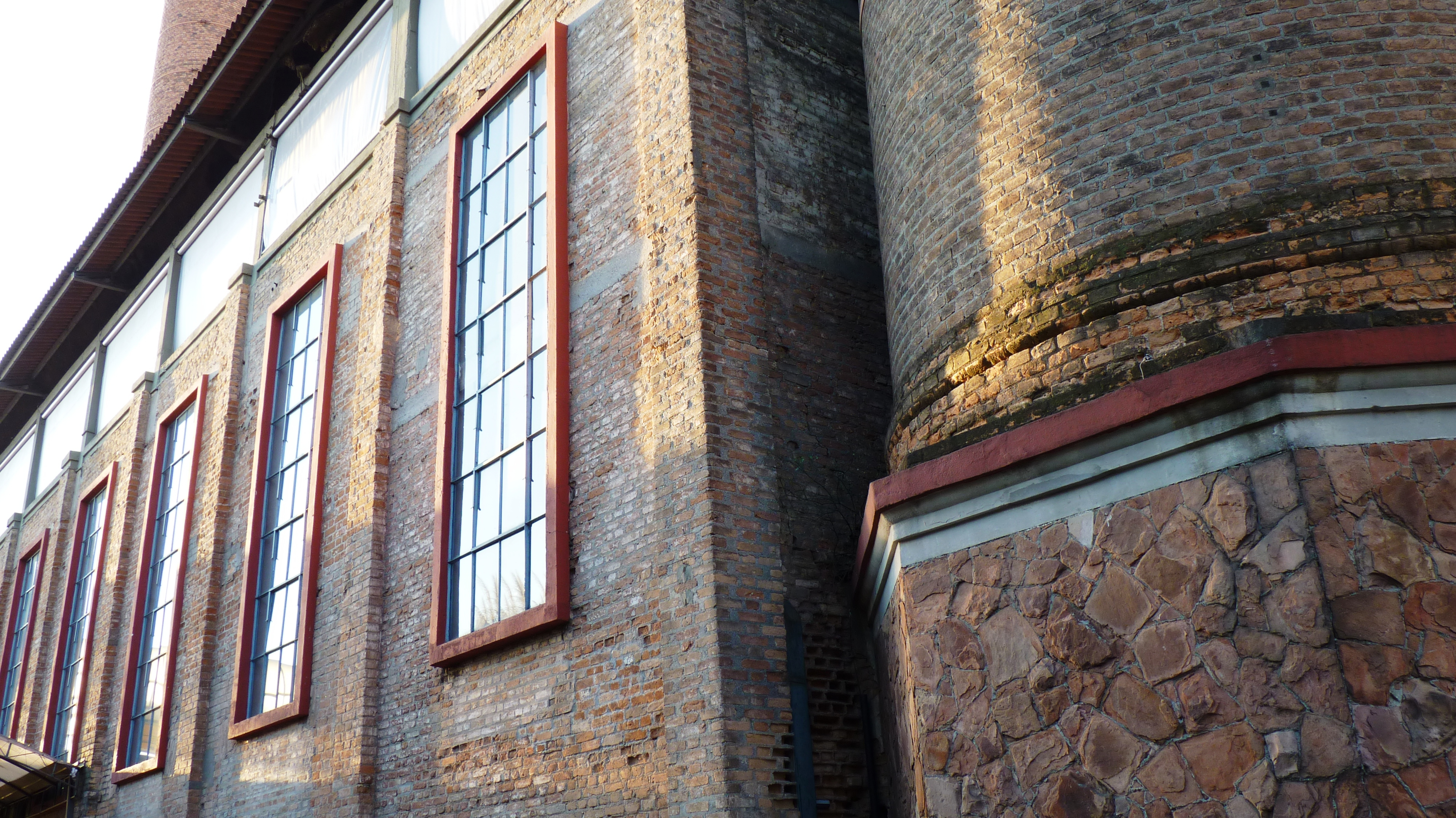 São Paulo